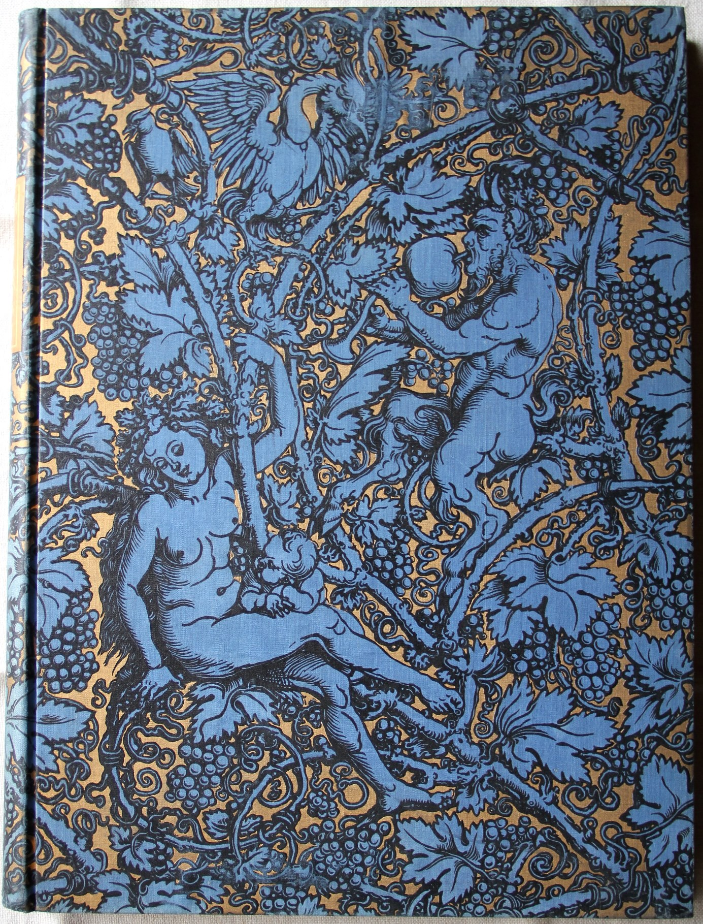 Foto Einband der Ausgabe von Freidrich Lippmann von 1894